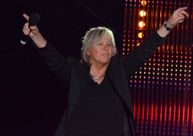 Patrick Juvet au concert "La Folie des années 80" à Enghien-les-Bains